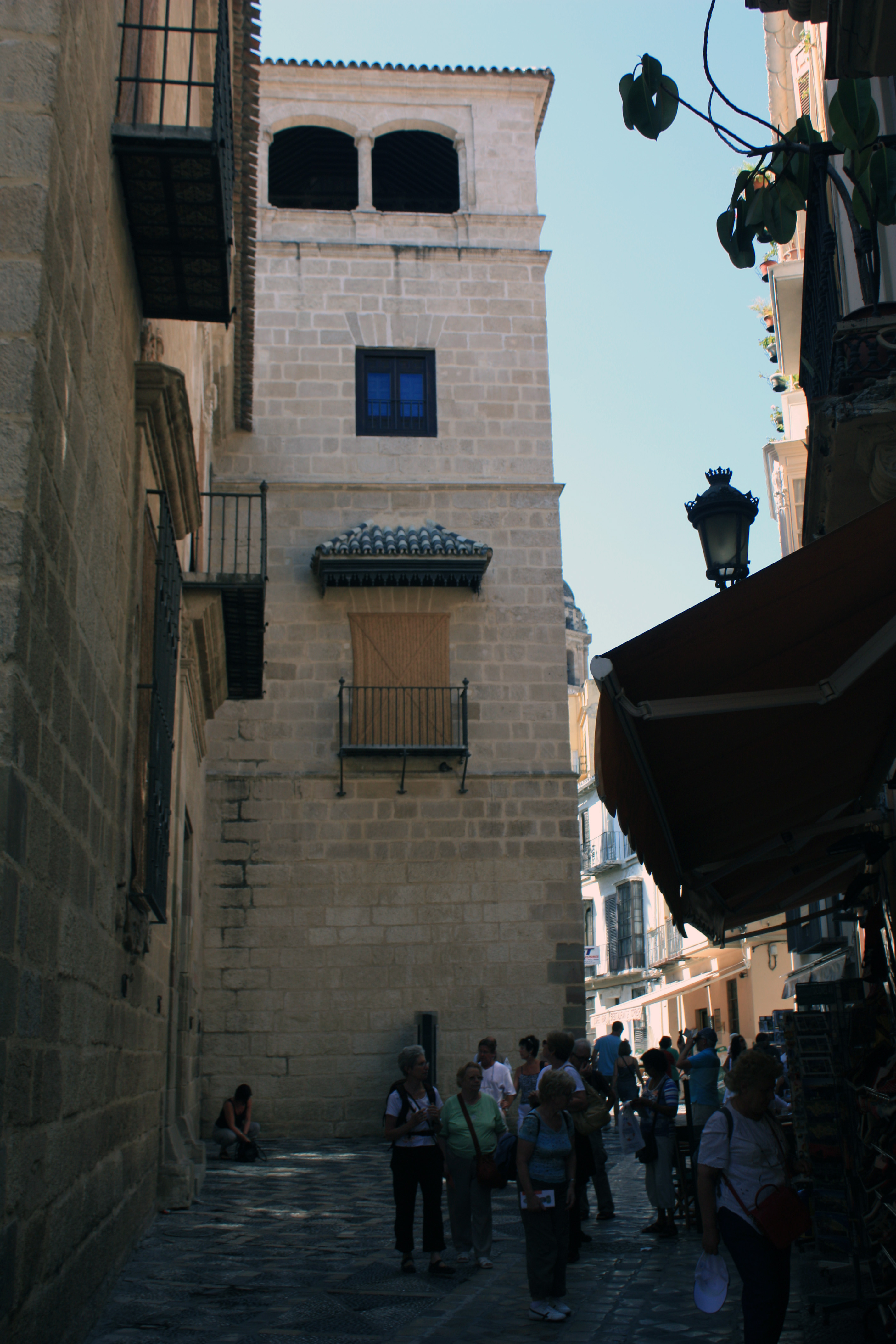 Palais de Comtes de Buenavista, musée Picasso